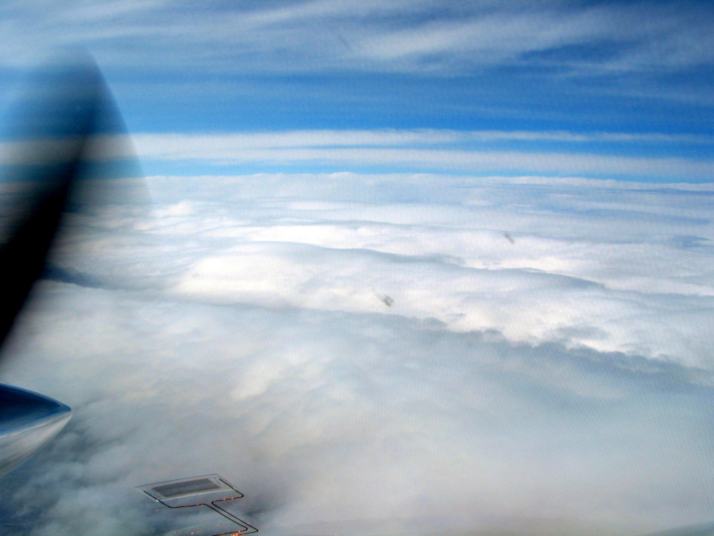 Wavy Clouds